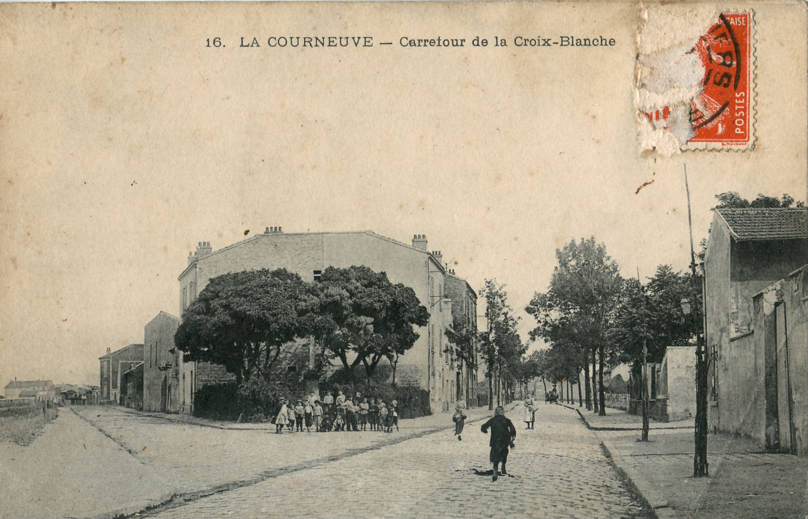 Carte postale ancienne sans mention d'éditeur, n°16 : LA COURNEUVE - Carrefour de la Croix-Blanche